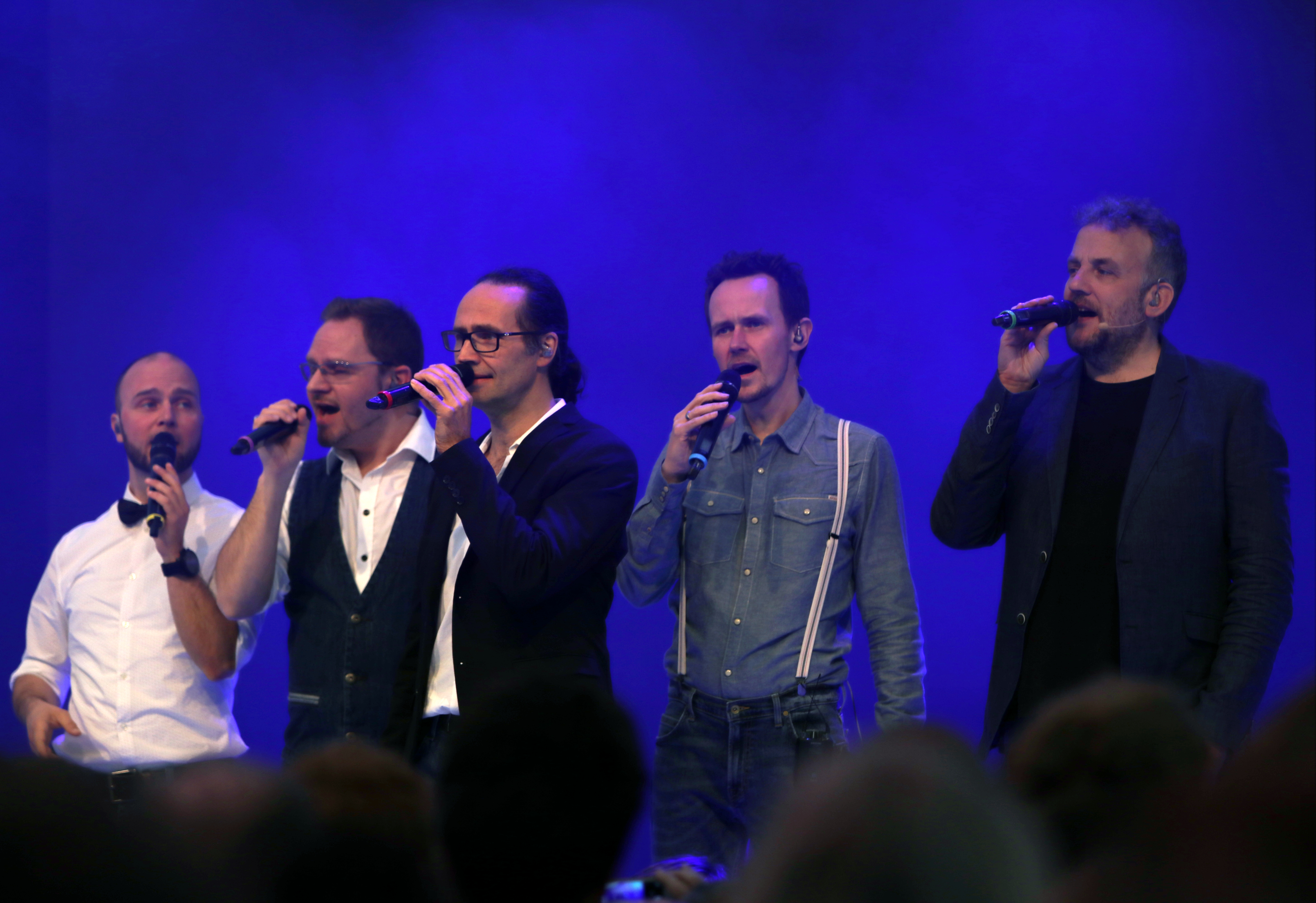 Wise Guys in München